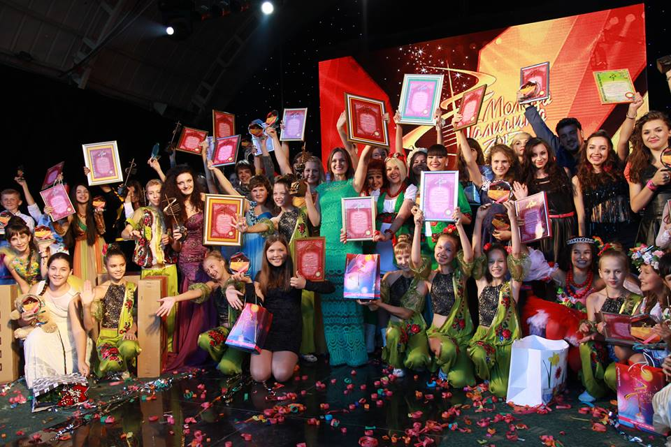 Урочиста церемонія нагорожнення переможців фестивалю "Молода Галичина"